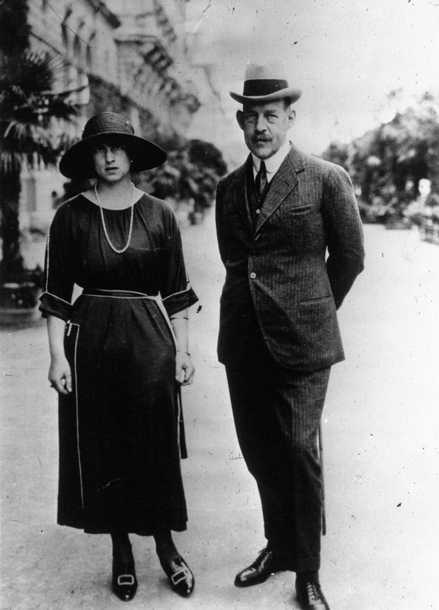 Le roi Constantin de Grèce avec sa fille.